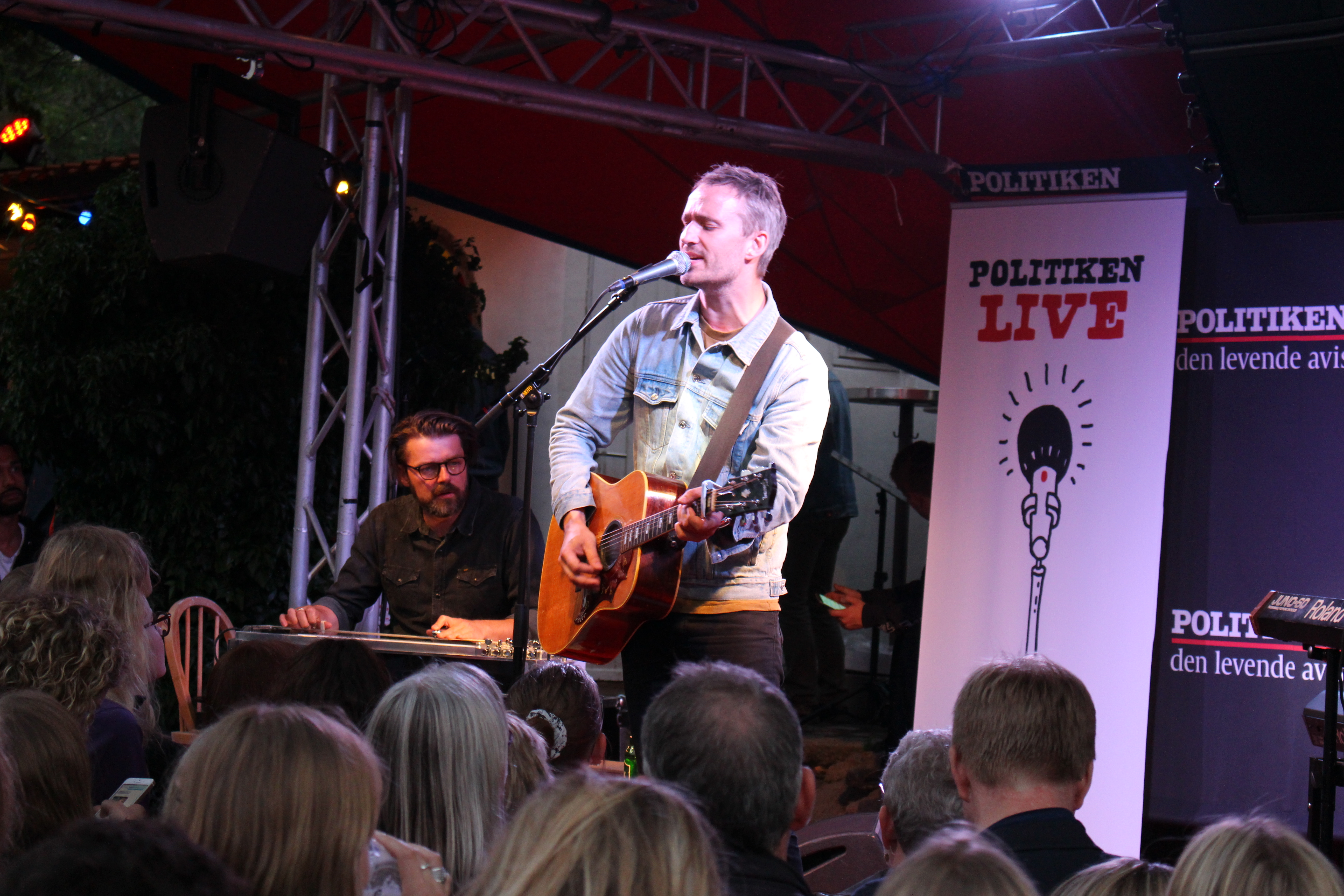 Koncert med den danske sanger Rasmus Walter under Folkemødet 2016 på Gæstgiveren